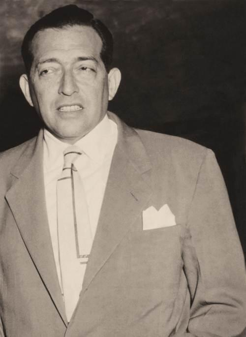 Fotografía de los años 1950 de Pedro Estrada Albornoz, Jefe de la Dirección de Seguridad Nacional de Venezuela durante el Gobierno de Marcos Pérez Jiménez.